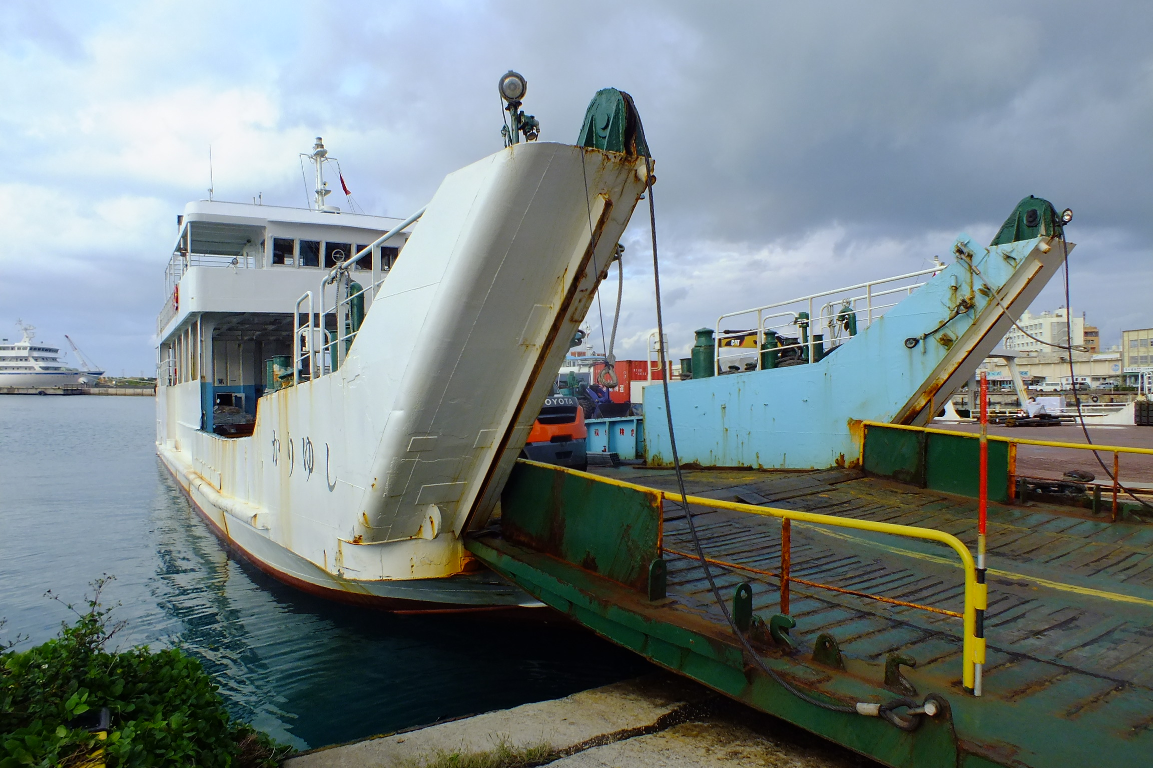 2017-01-26 Ferryboat "Kariyushi" Yaeyama Kanko Ferry 八重山観光フェリー貨客船「かりゆし」石垣港